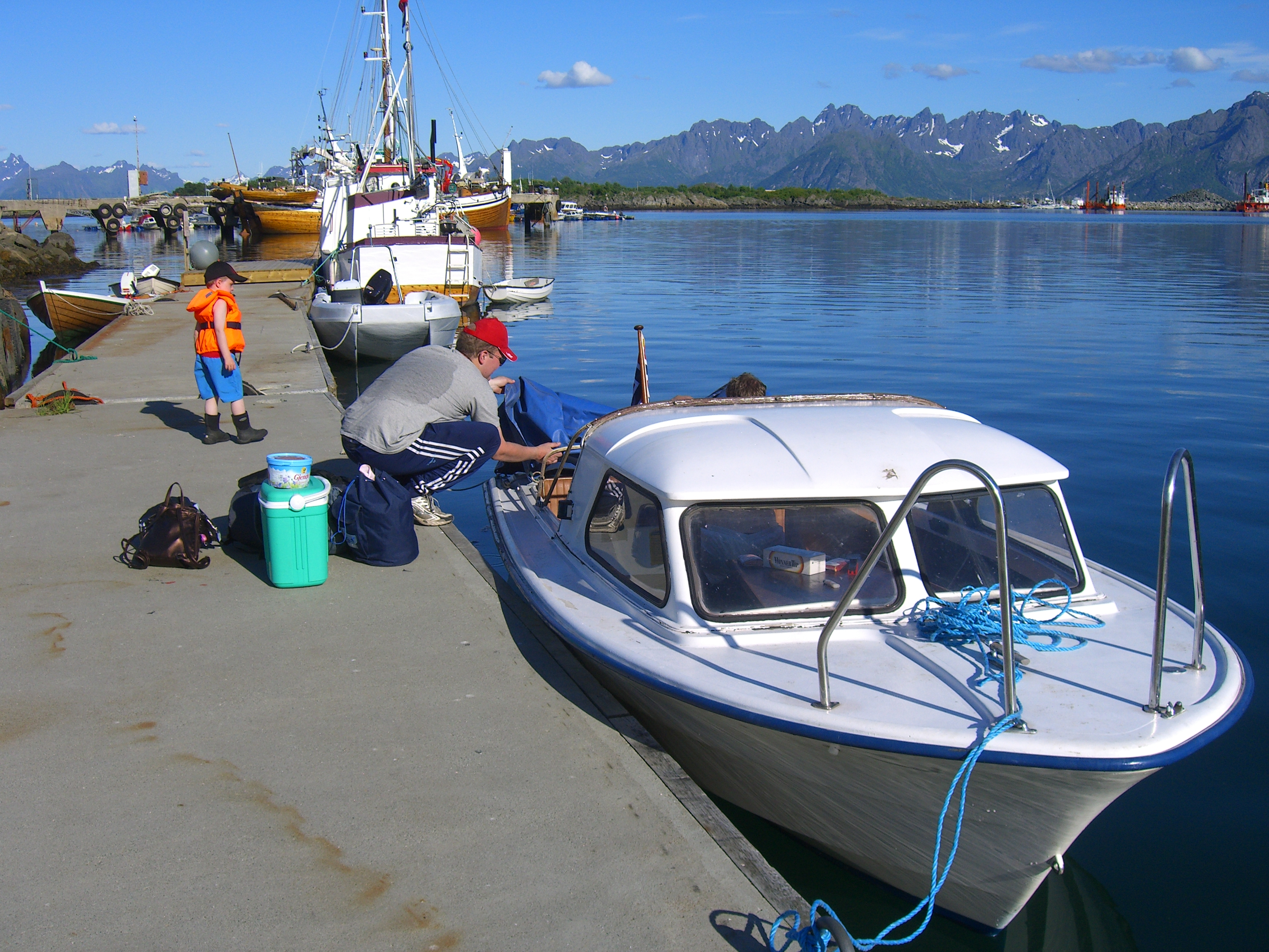 Fjordling17